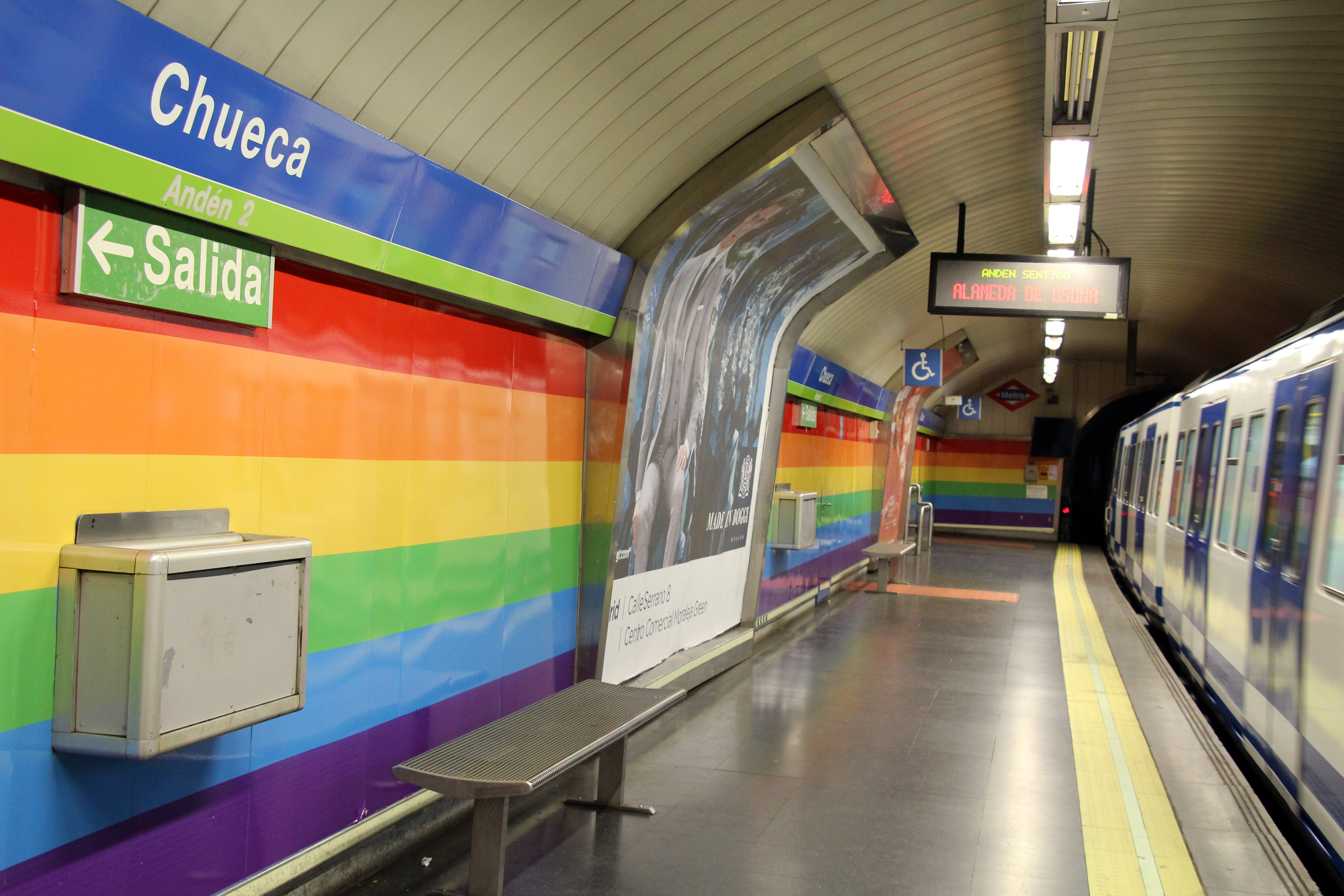 Chueca | Plaza de Chueca Chueca metro station.